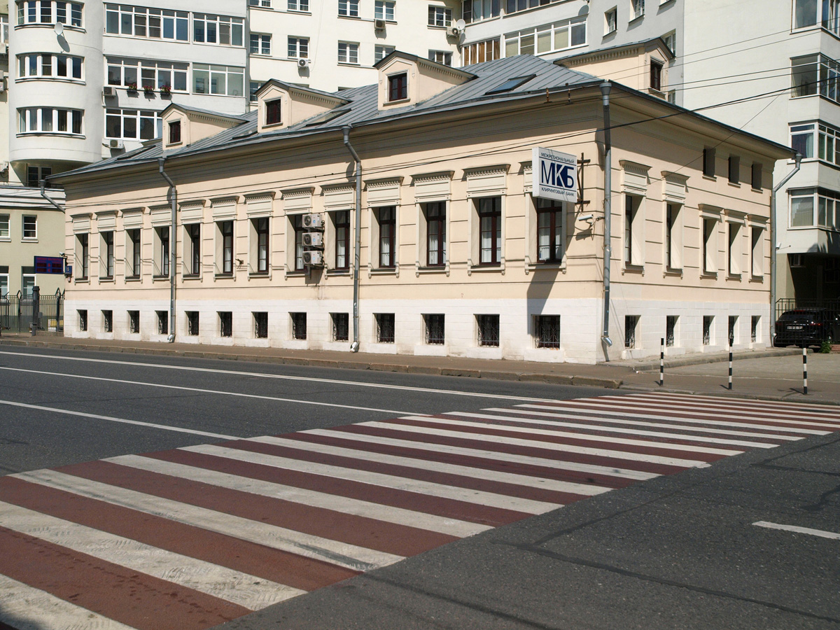 Taganskaya Street, Moscow